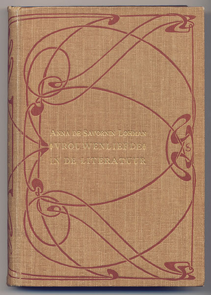 Boekomslag: Vrouwenliefde in de literatuur. 1e druk 1902. Auteur: A. de Savornin Lohman. Bandontwerp: A. Sipkema. Uitgeverij: P.N. van Kampen & Zn